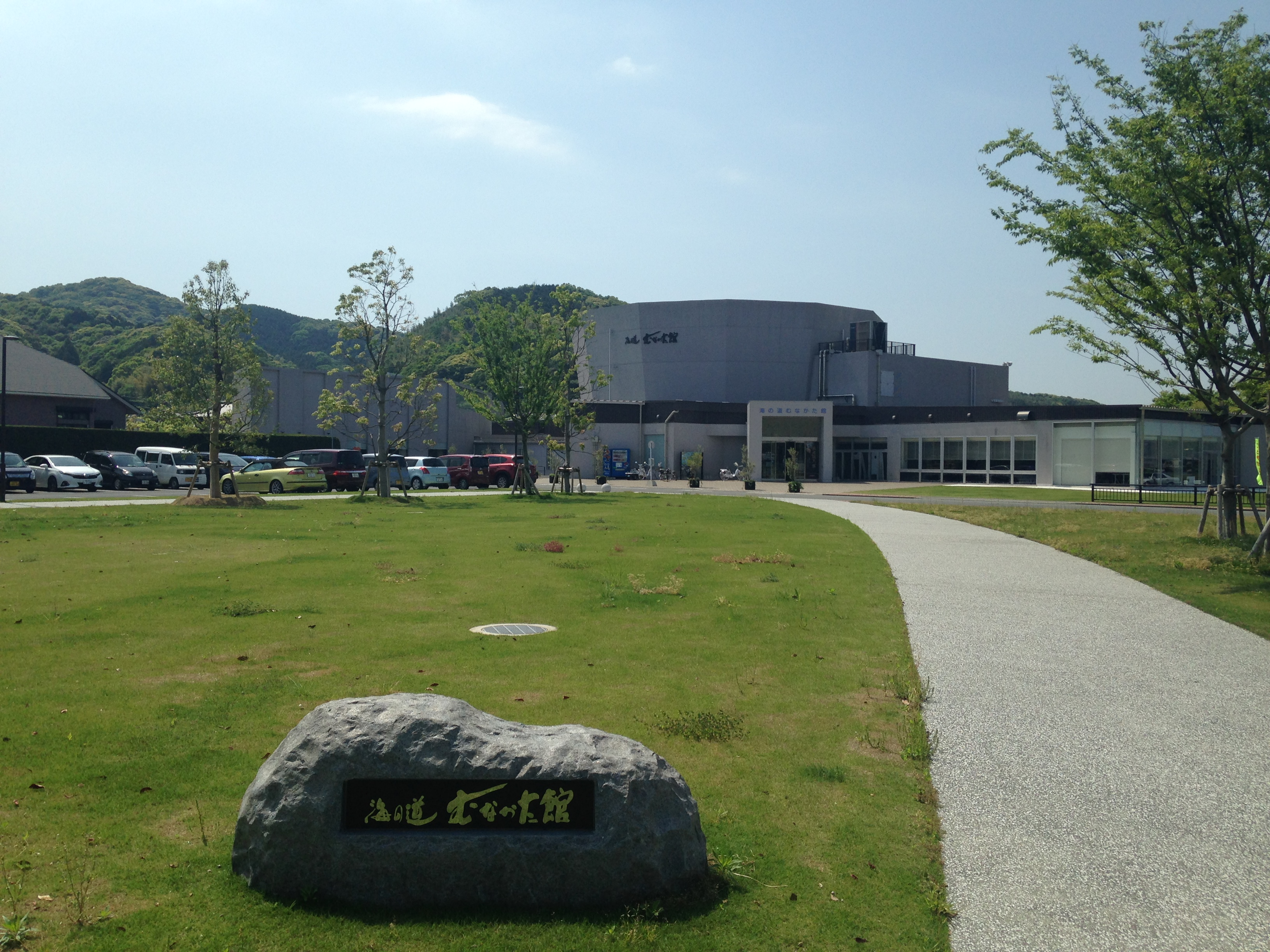 海の道むなかた館(宗像市郷土文化学習交流館)